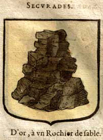 Securades